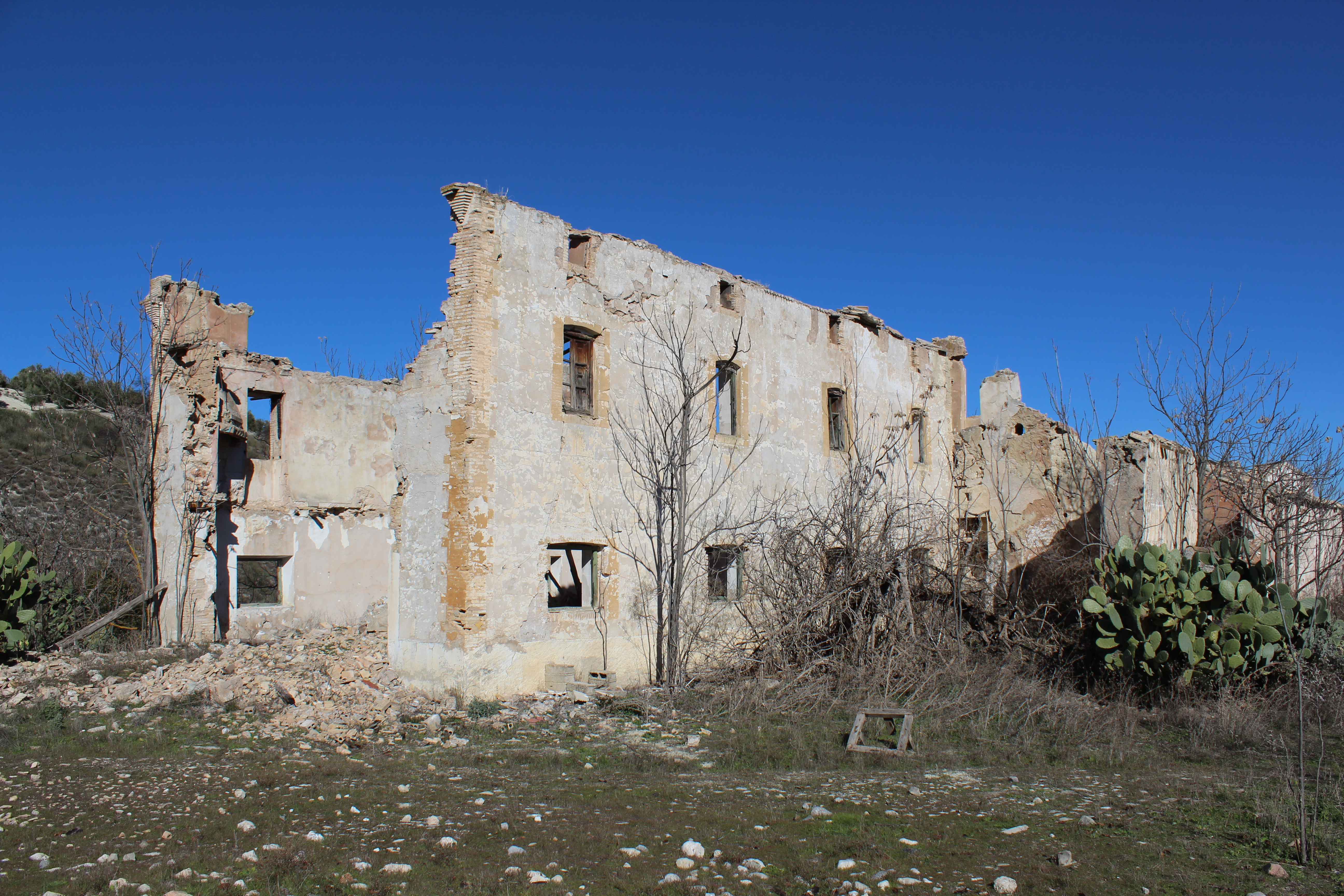 Los cortijos abandonados de Recena.